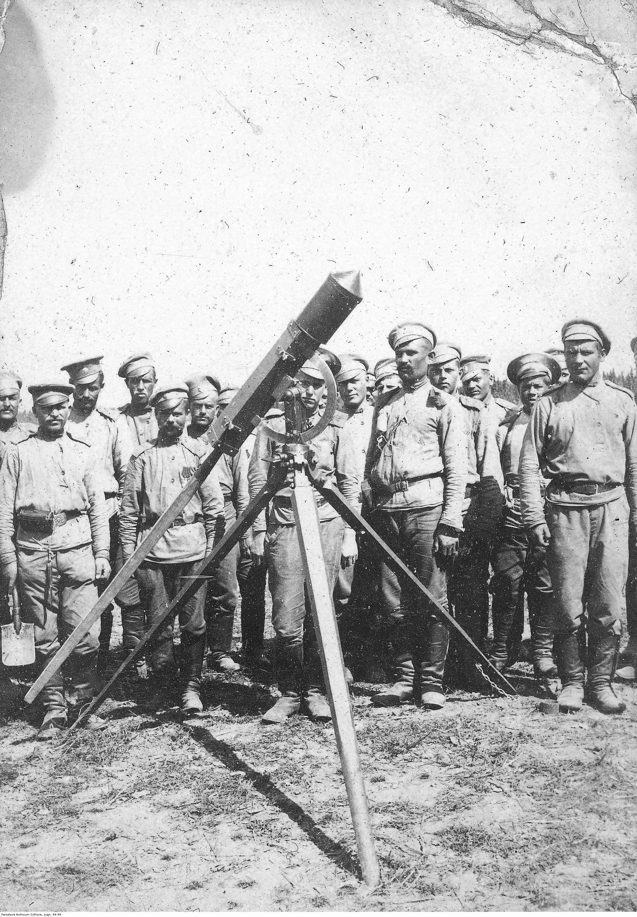 Grupa żołnierzy rosyjskich przy rakiecie.